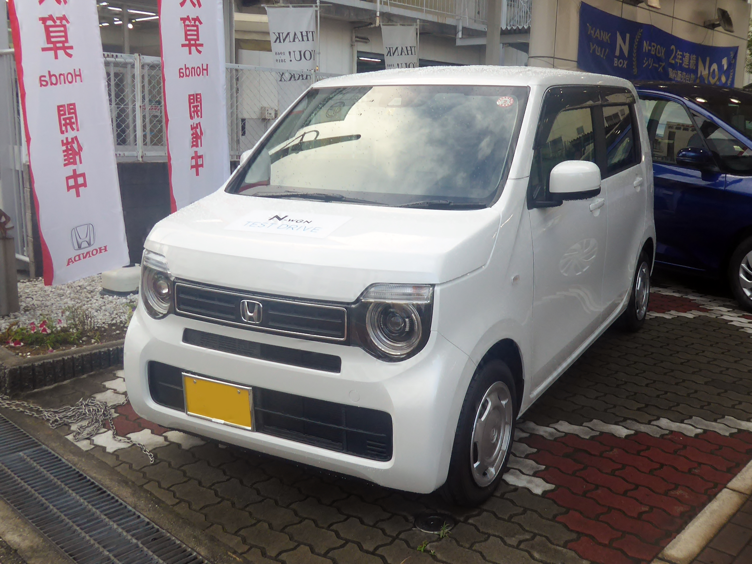 DBA-JH3型ホンダ・N-WGN L・Honda SENSING 2WDを撮影。